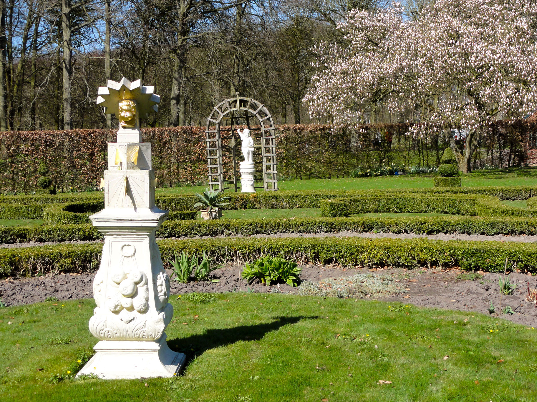 Sierelementen in de tuin van de Menkemaborg in Uithuizen